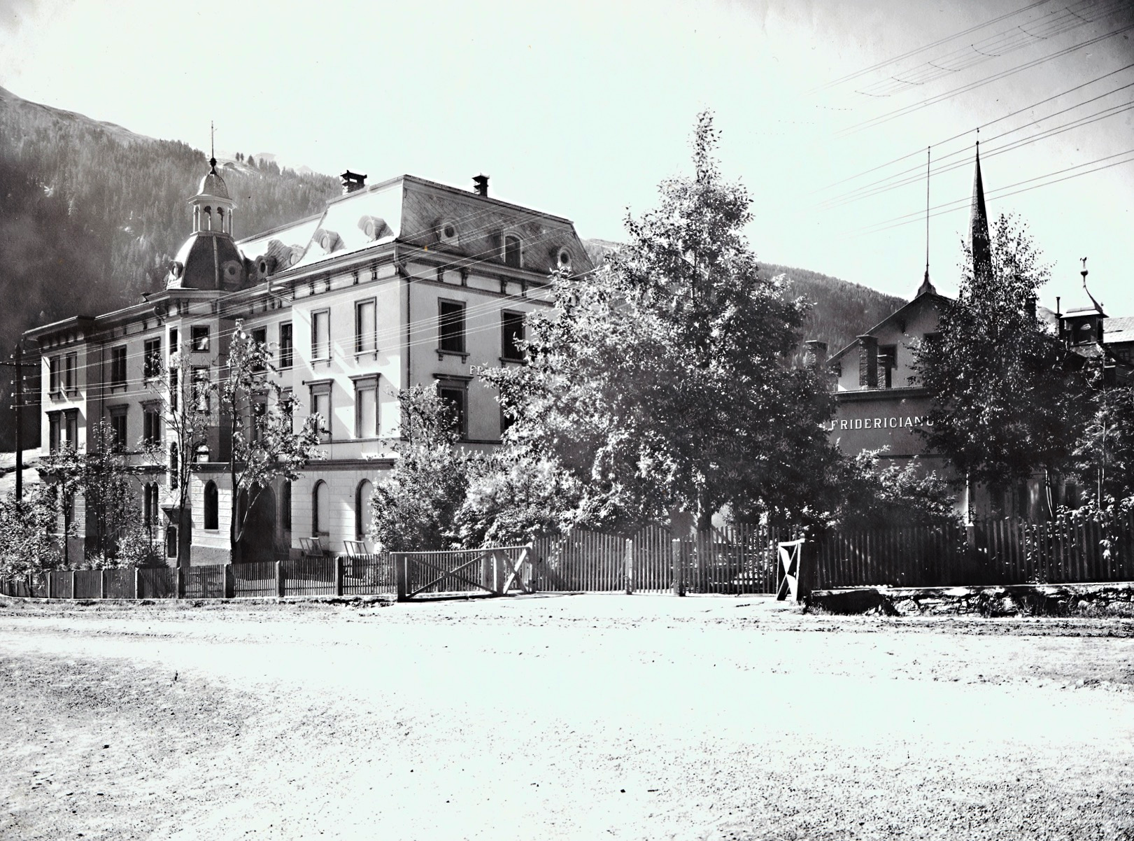 Das Fridericianum in Davos, Kanton Graubünden, Schweiz, ein Sanatorium für lungenkranke Kinder (Asthma, Bronchitis, Tuberkulose…) mit angeschlossenem gymnasialen Internat.